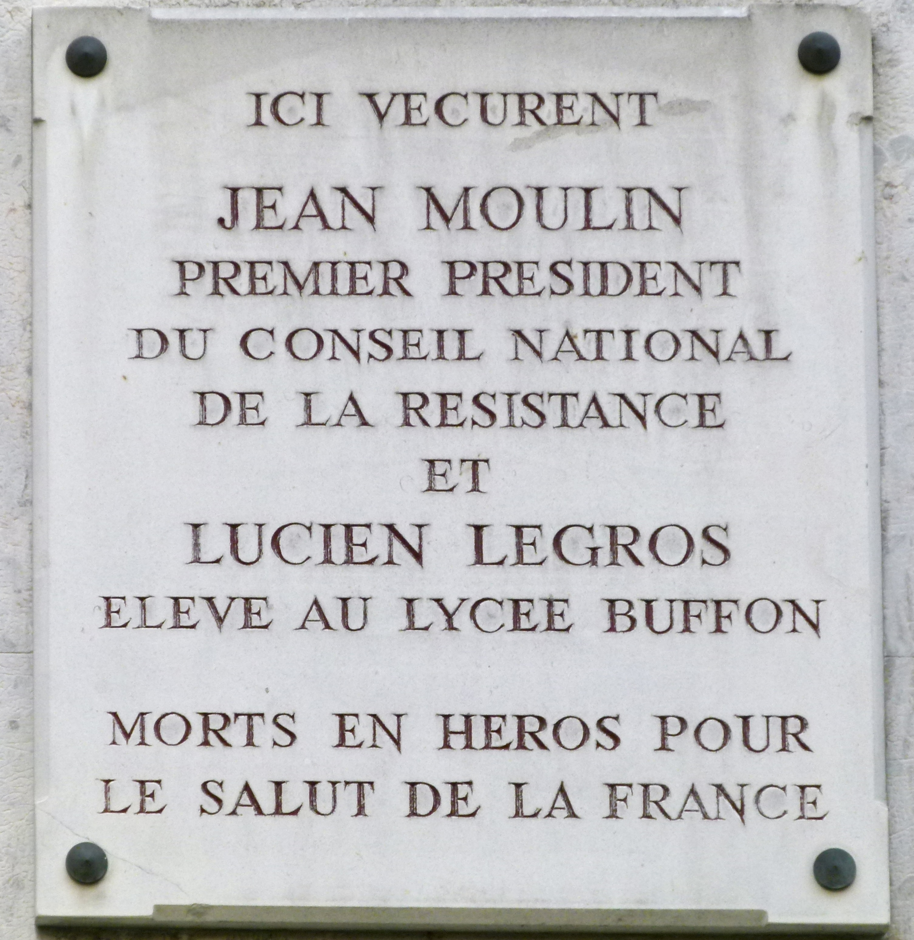 Plaque commémorative Jean Moulin - Lucien Legros sur l'immeuble du 26 rue des Plantes Paris 14ème.